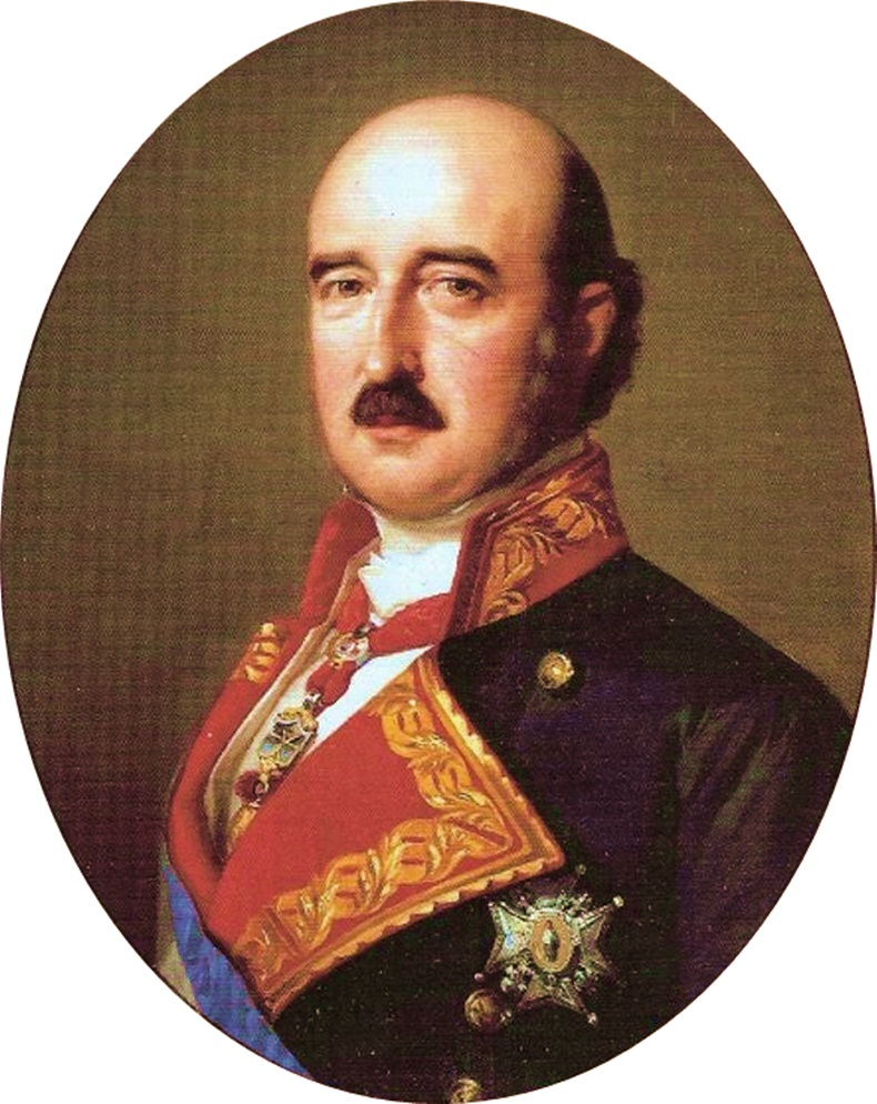 Agustín Fernando Muñoz y Sánchez (1808-1873), duque de Riánsares